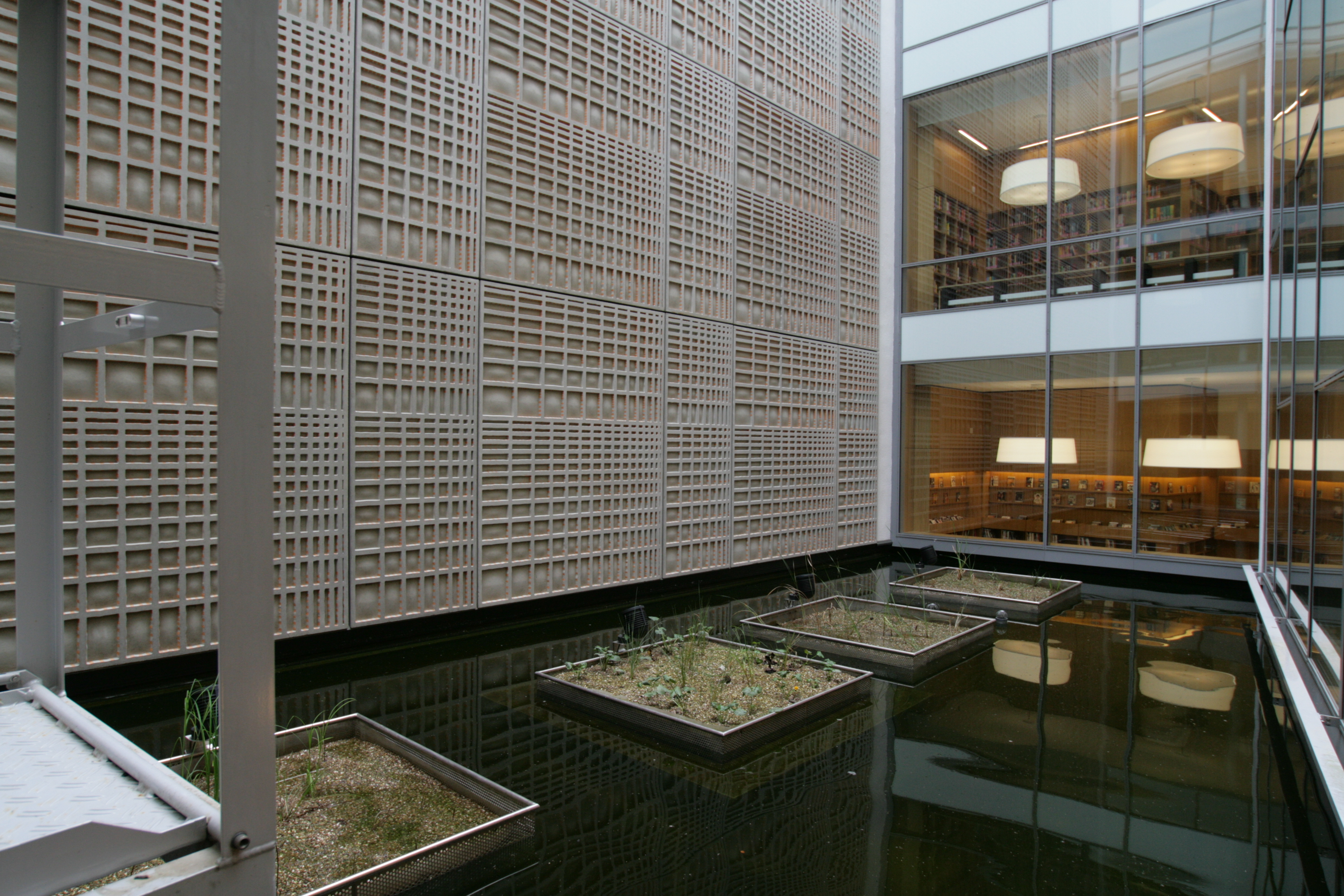 Bibliothek, Luxemburg